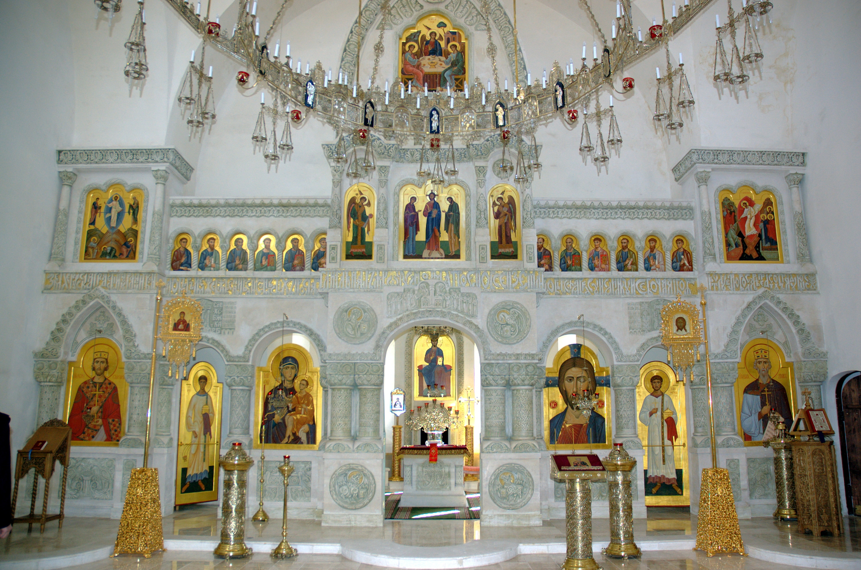 «И пришли мы в Греческую землю, и ввели нас туда, где служат они Богу своему, и не знали — на небе или на земле мы: ибо нет на земле такого зрелища и красоты такой, и не знаем, как и рассказать об этом, — знаем мы только, что пребывает там Бог с людьми, и служба их лучше, чем во всех других странах. Не можем мы забыть красоты той, ибо каждый человек, если вкусит сладкого, не возьмет потом горького; так и мы не можем уже здесь пребывать». Повесть временных лет. Трудно представить, сколь красивым станет храм с фресковой росписью.